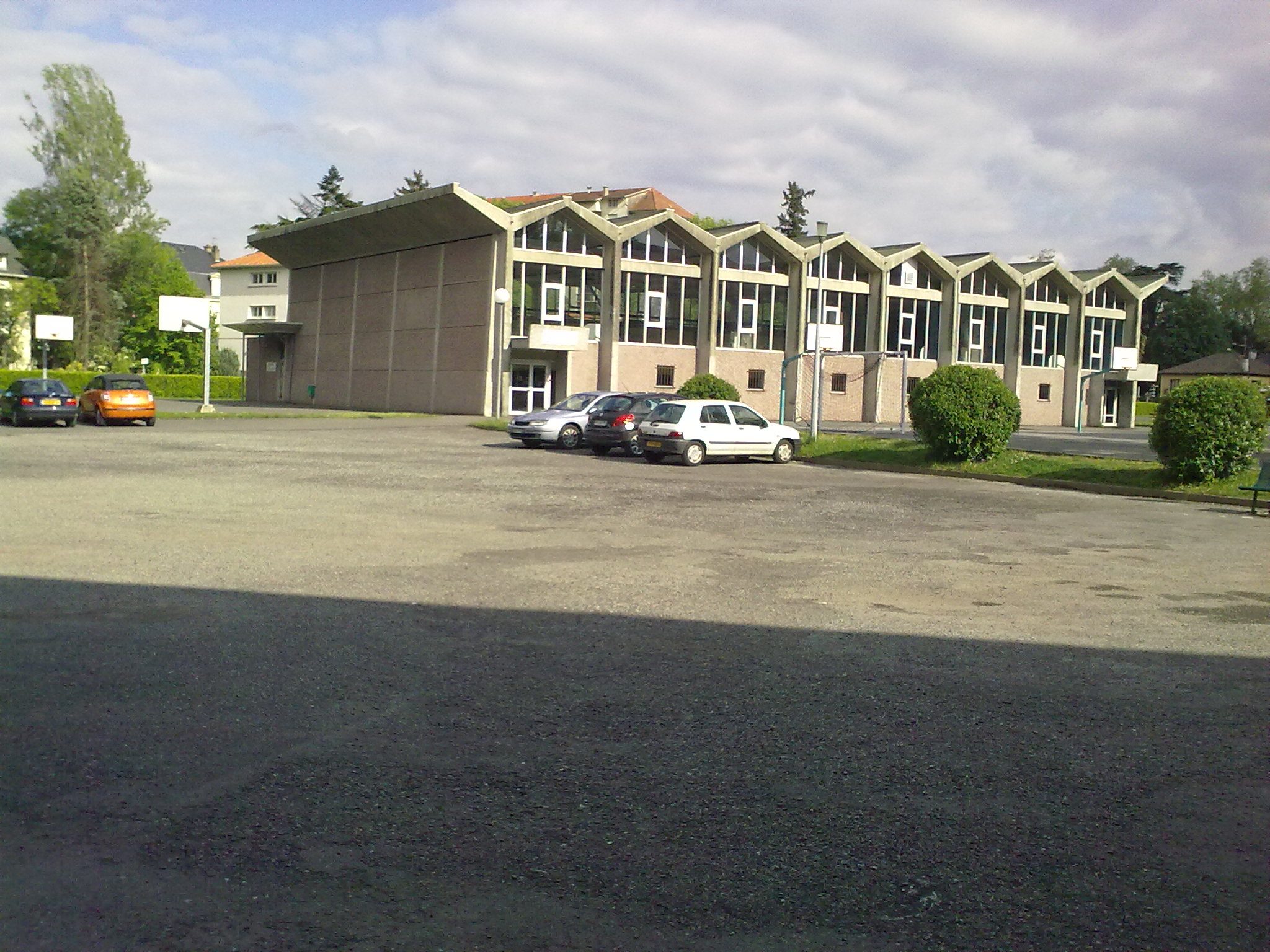 lycée Saint - Cricq, Pau, France